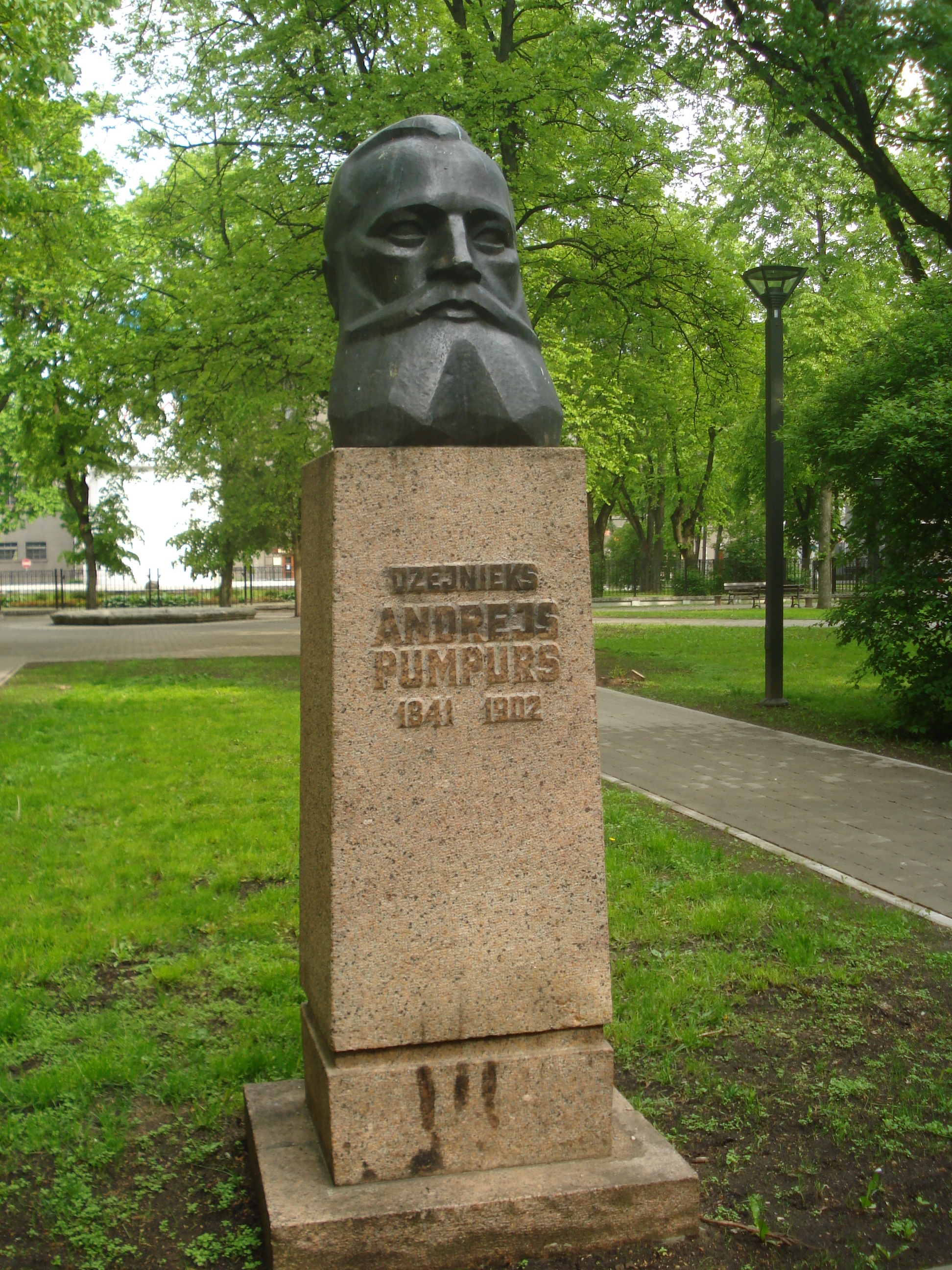 Bust of Andrejs Pumpurs (1841-1902), Latvian poet in Daugavpils. Created by tēlniece J. Volkova, скульптор Елена Волкова. Andreja Pumpura (1841.–1902.) krūšutēls.